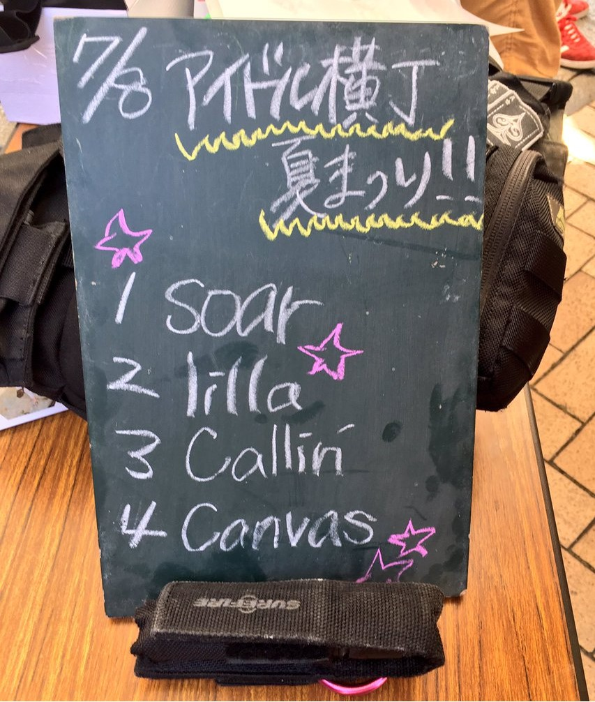 amiinAセトリボード(20170708(1))